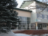 БелСХБ зимой